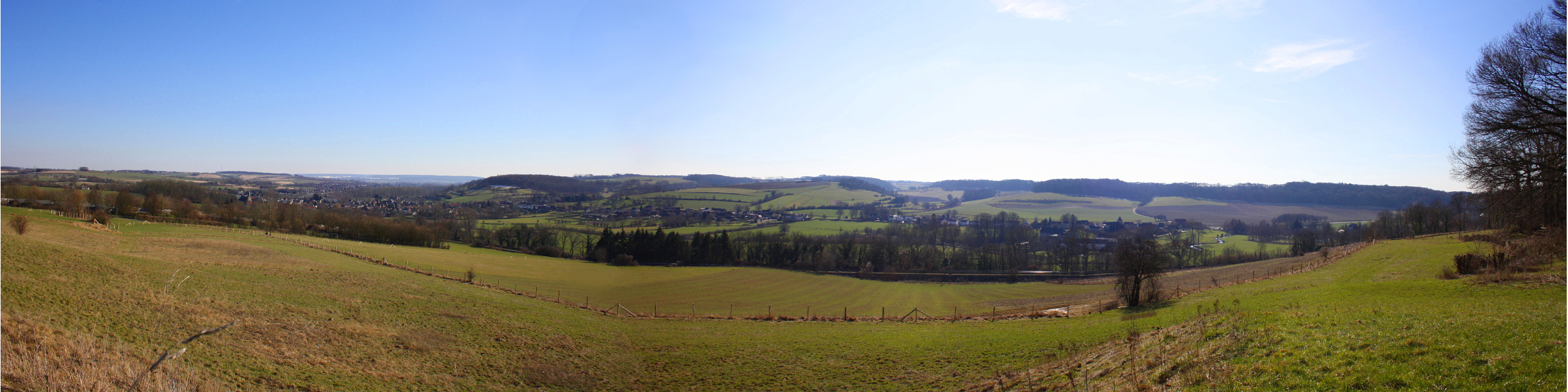 Panoramafoto van het heuvelland tussen Schin op Geul en Valkenburg.